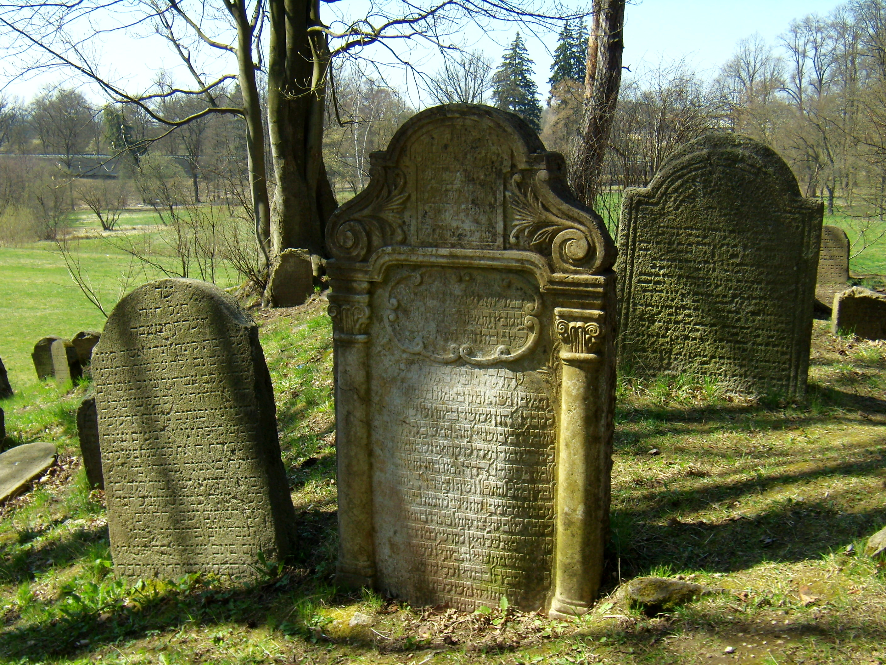 Chodová Planá - starý ŽH